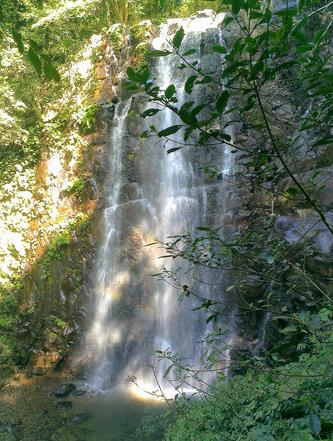 滿月圓的處女瀑布